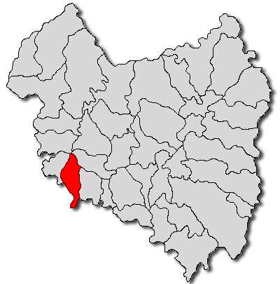 Categorie:Hărţi ale judeţului Covasna